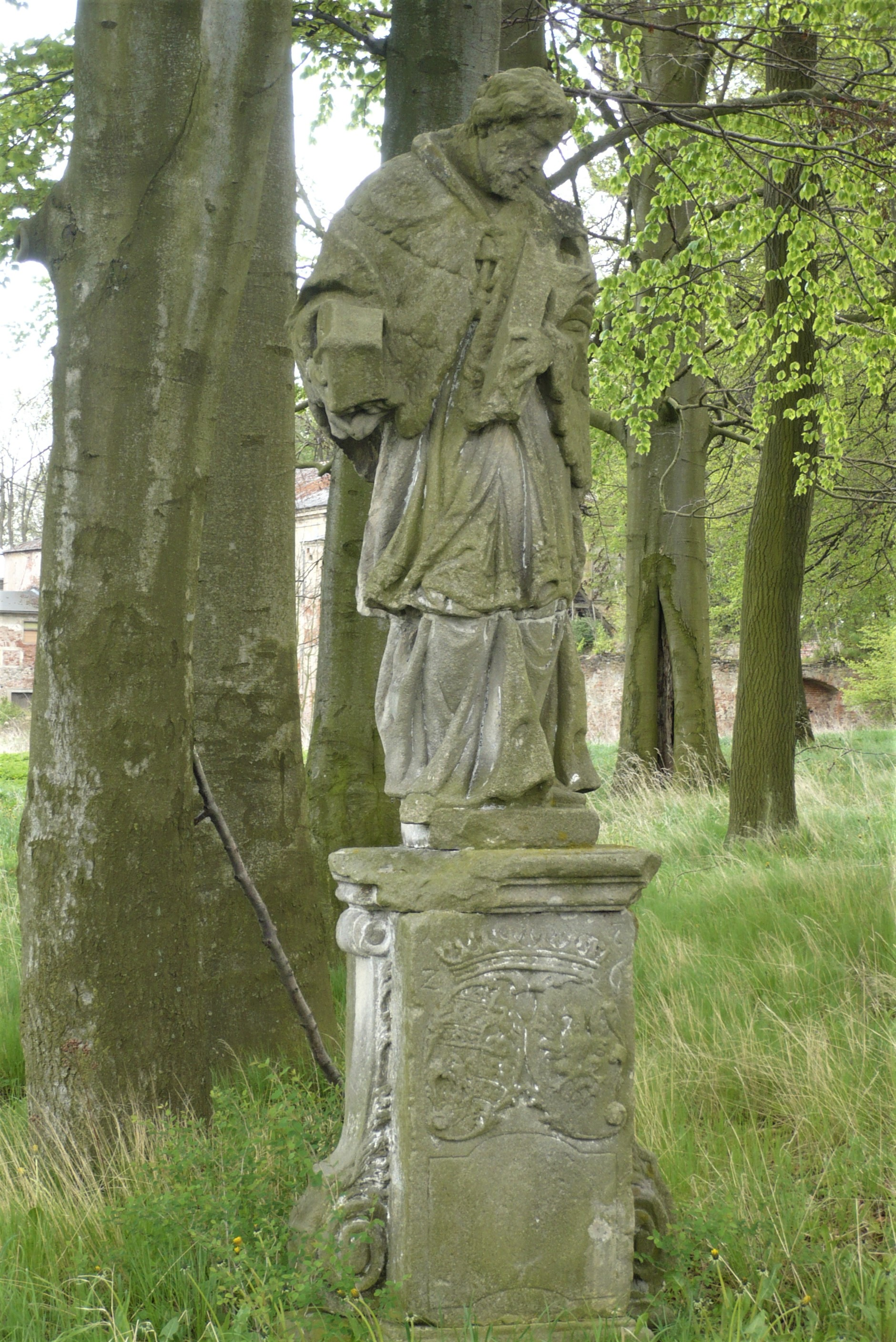 Nepomucen w Korytowie